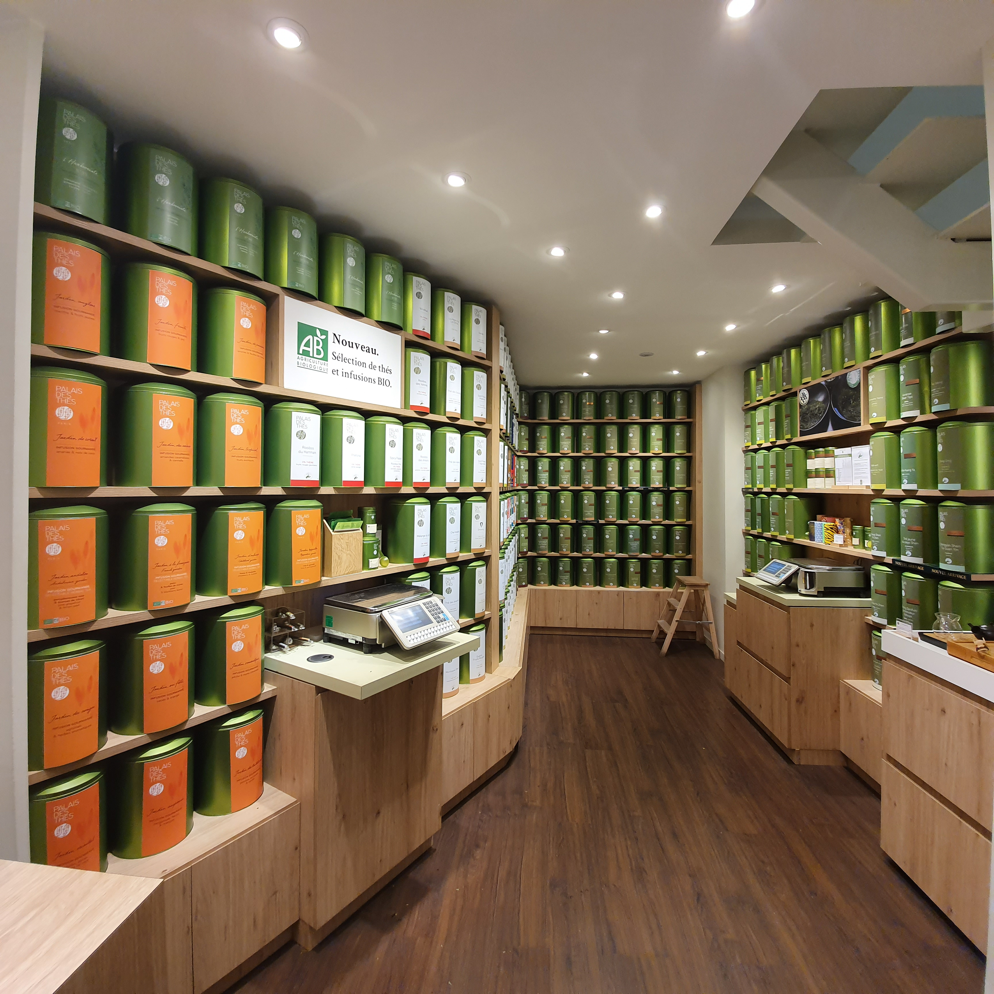 Intérieur d'un magasin palais des Thés